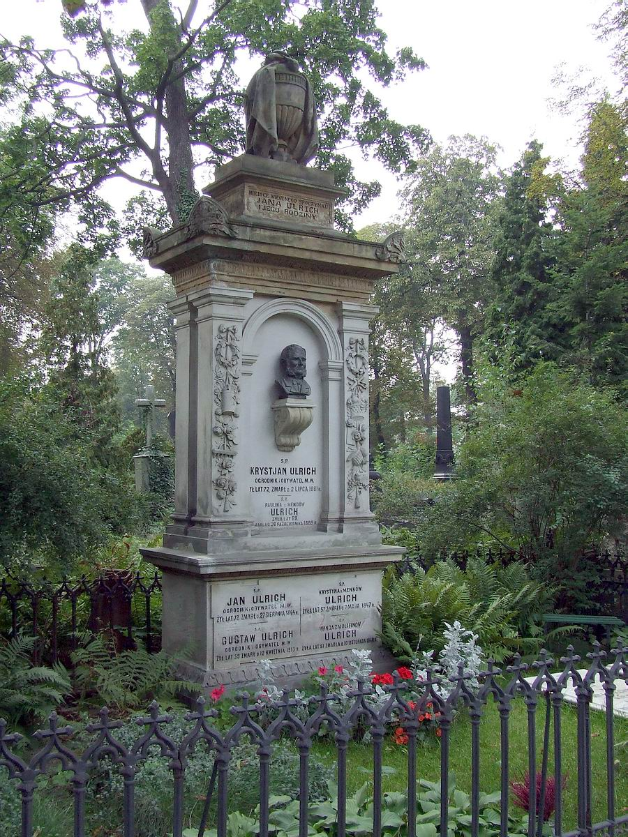 Krystian Ulrich, grób, Cmentarz Ewangelicko-Augsburski w Warszawie